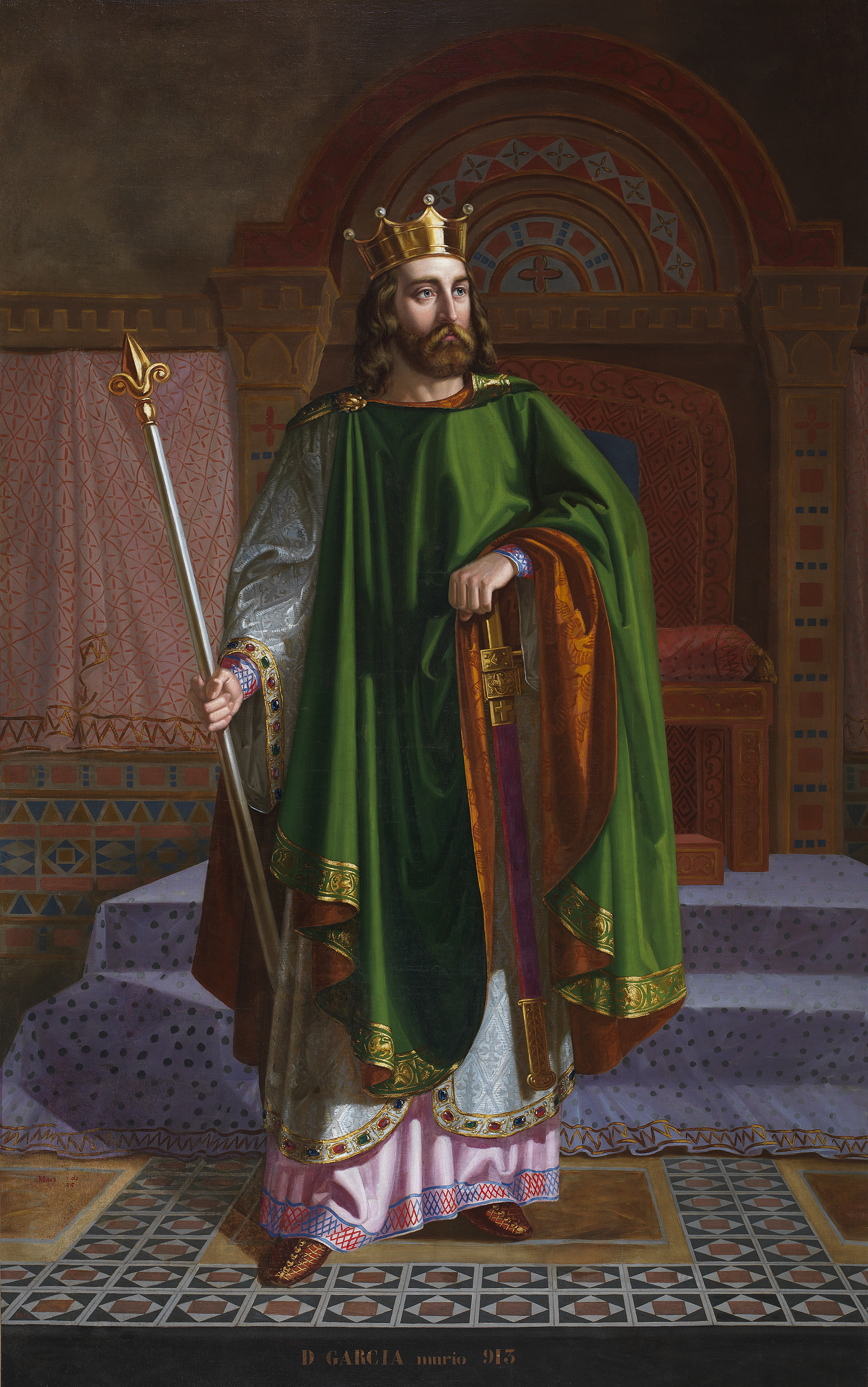 Retrato imaginario del rey García I de León († 914), que fue hijo de Alfonso III de Asturias y de la reina Jimena de Asturias. Fue hermano de los reyes Ordoño II de León y Fruela II de León, quienes le sucedieron en el trono leonés, al haber fallecido García I sin dejar descendencia. El monarca aparece sosteniendo con su mano derecha el cetro y apoya su mano izquierda sobre la empuñadura de la espada.